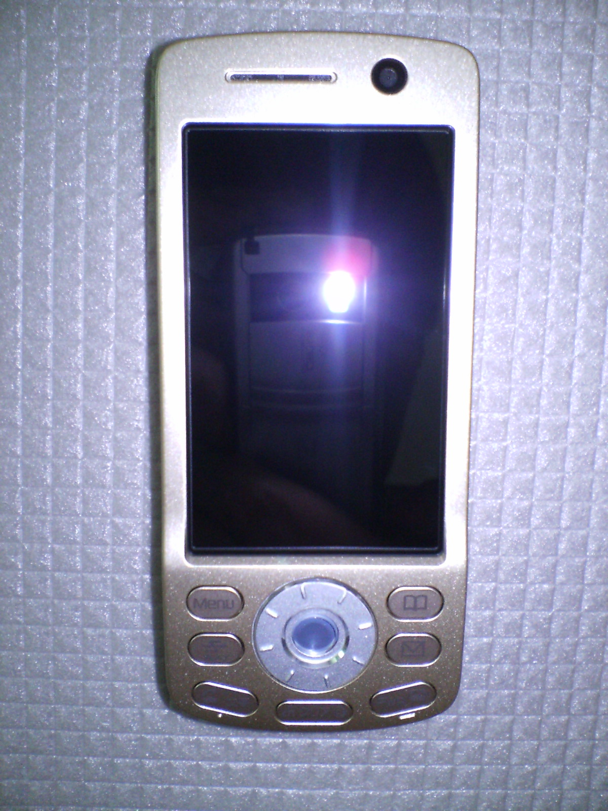 NTT DoCoMo FOMA D903i(Close)